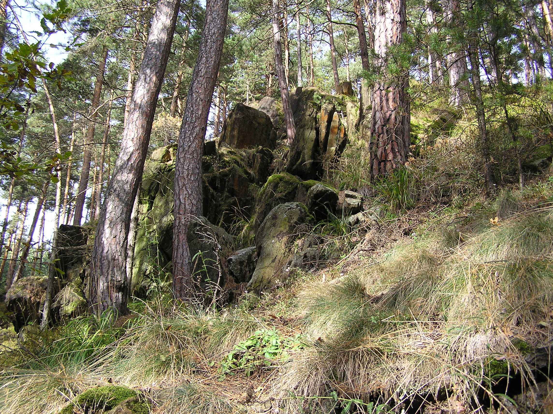 Skalní výchoz v přírodní rezervaci Holubovské hadce.